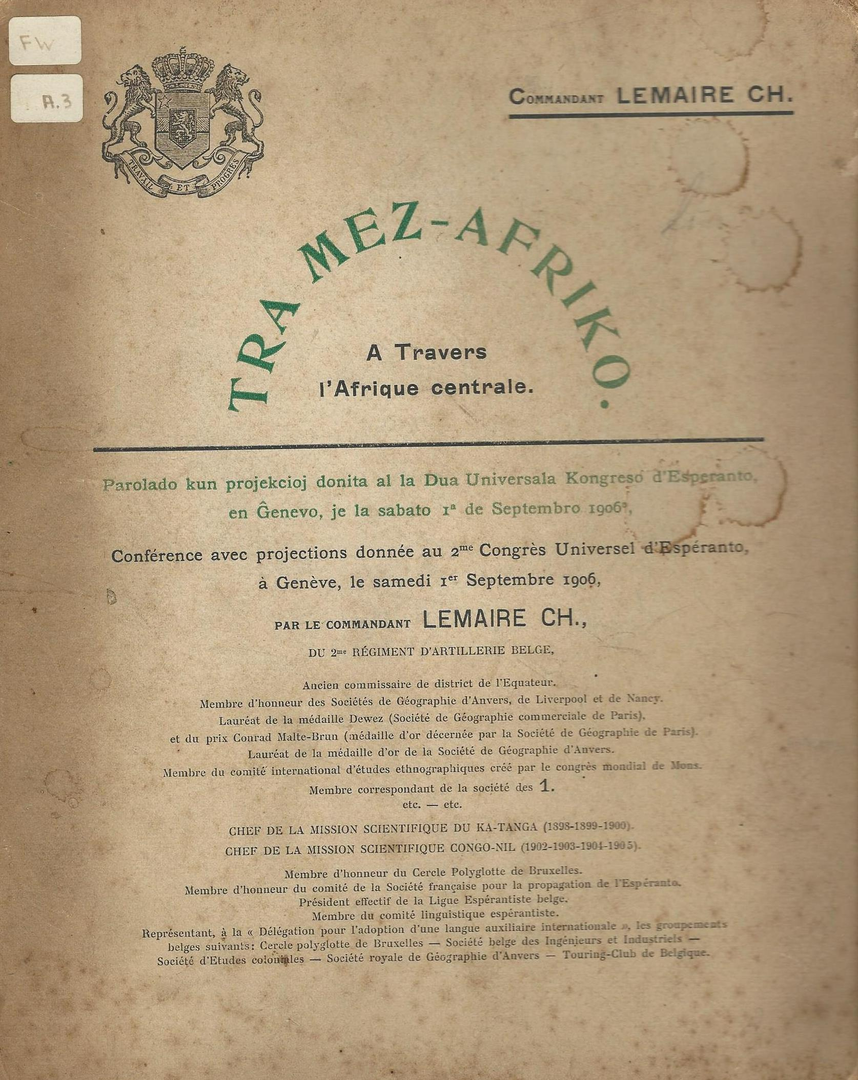 librokovrilo de "Tra Mez-Afriko", 1906